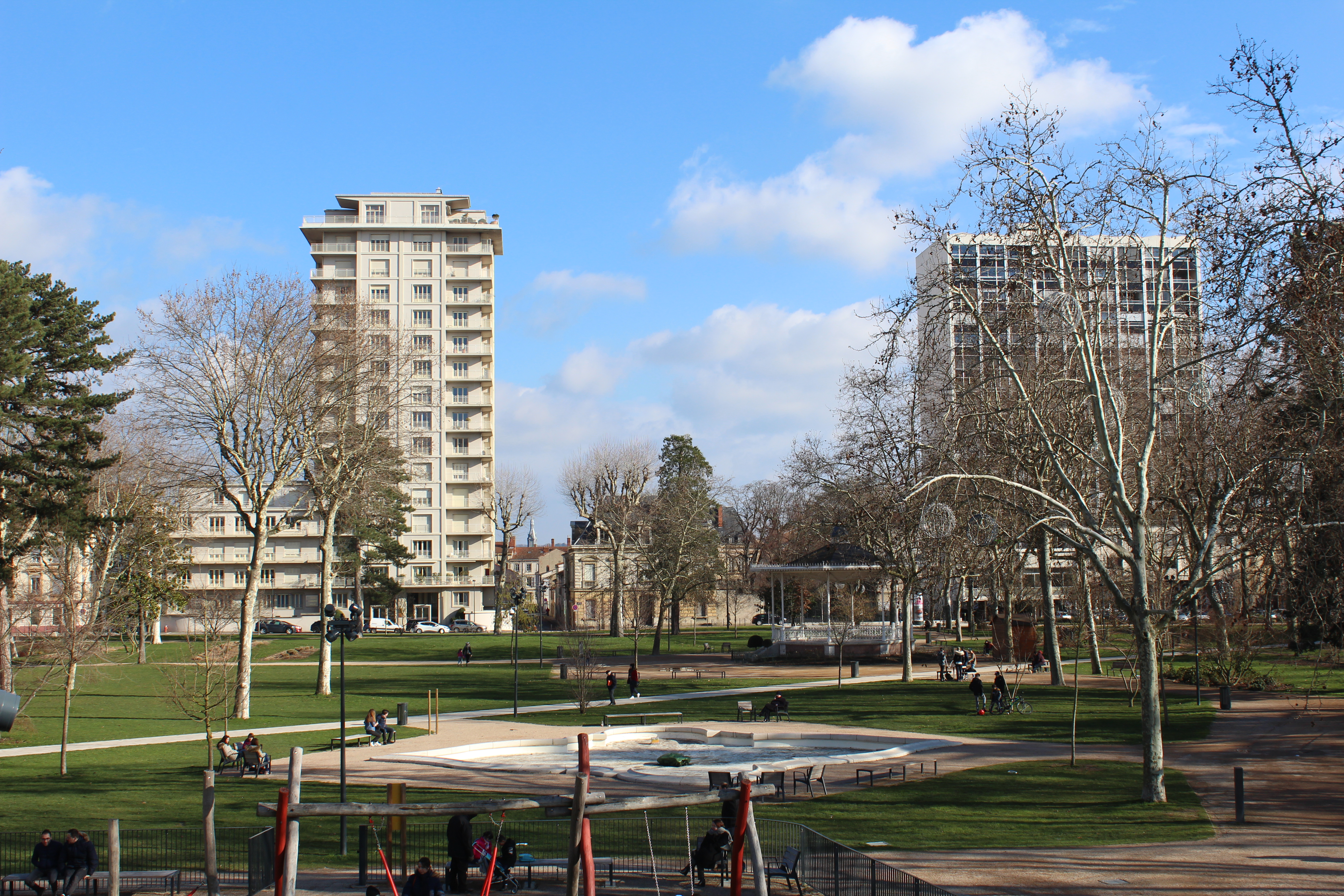 Place des Promenades-Populle, Roanne.